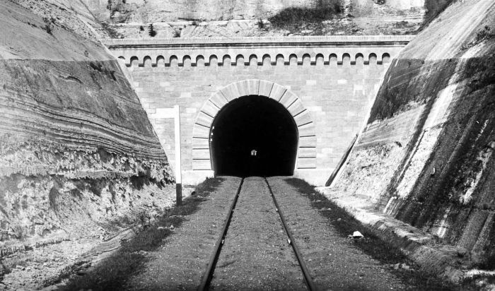 Repronegatief. Een tunnel bij de halte Idjo in de residentie Kedoe, Java, vermoedelijk gebouwd in 1885-1886